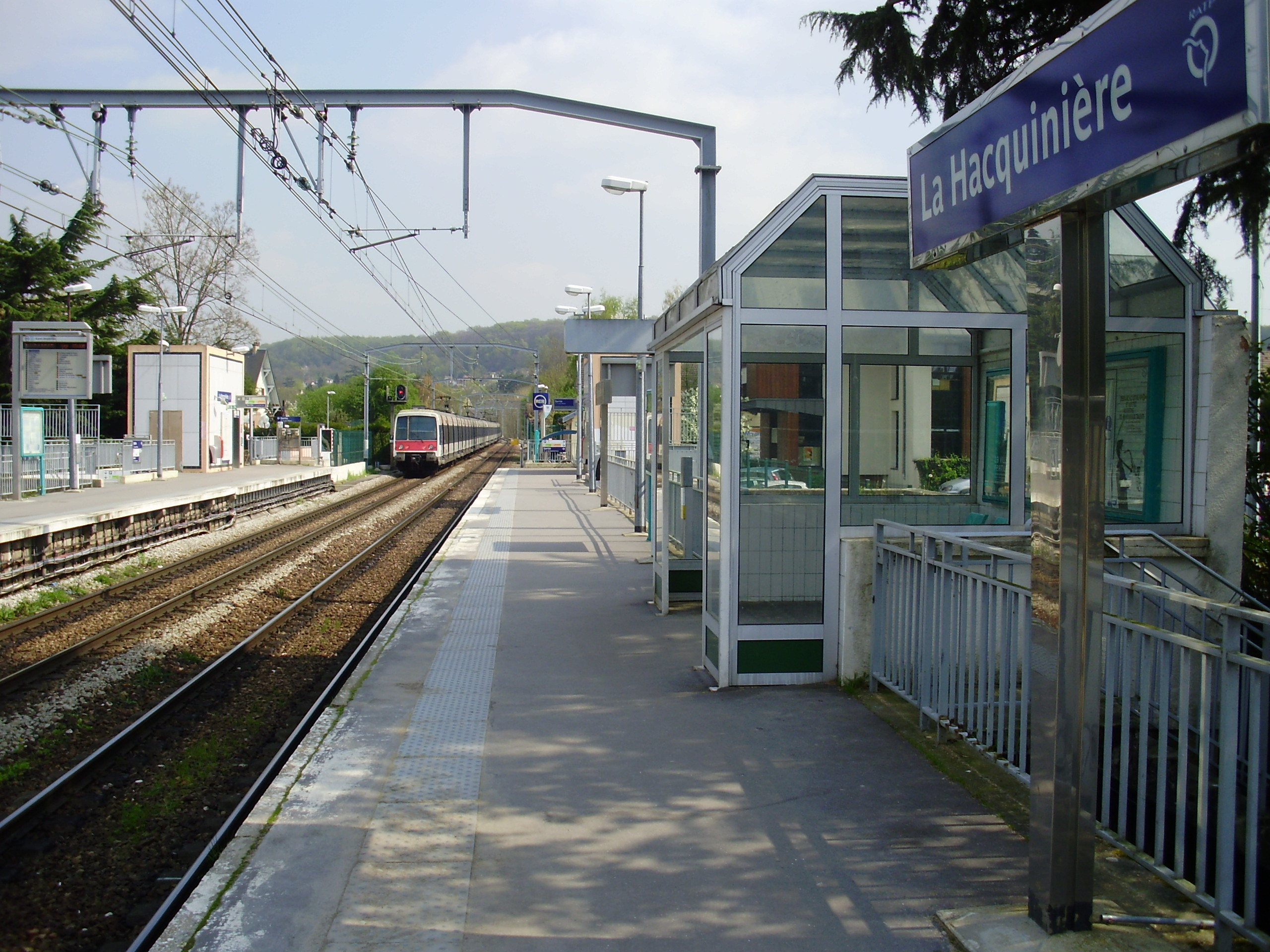 Gare de La Hacquinière, à Bures-sur-Yvette, Essonne, France (train quittant la gare et se dirigeant vers Aéroport Charles-de-Gaulle 2 TGV)